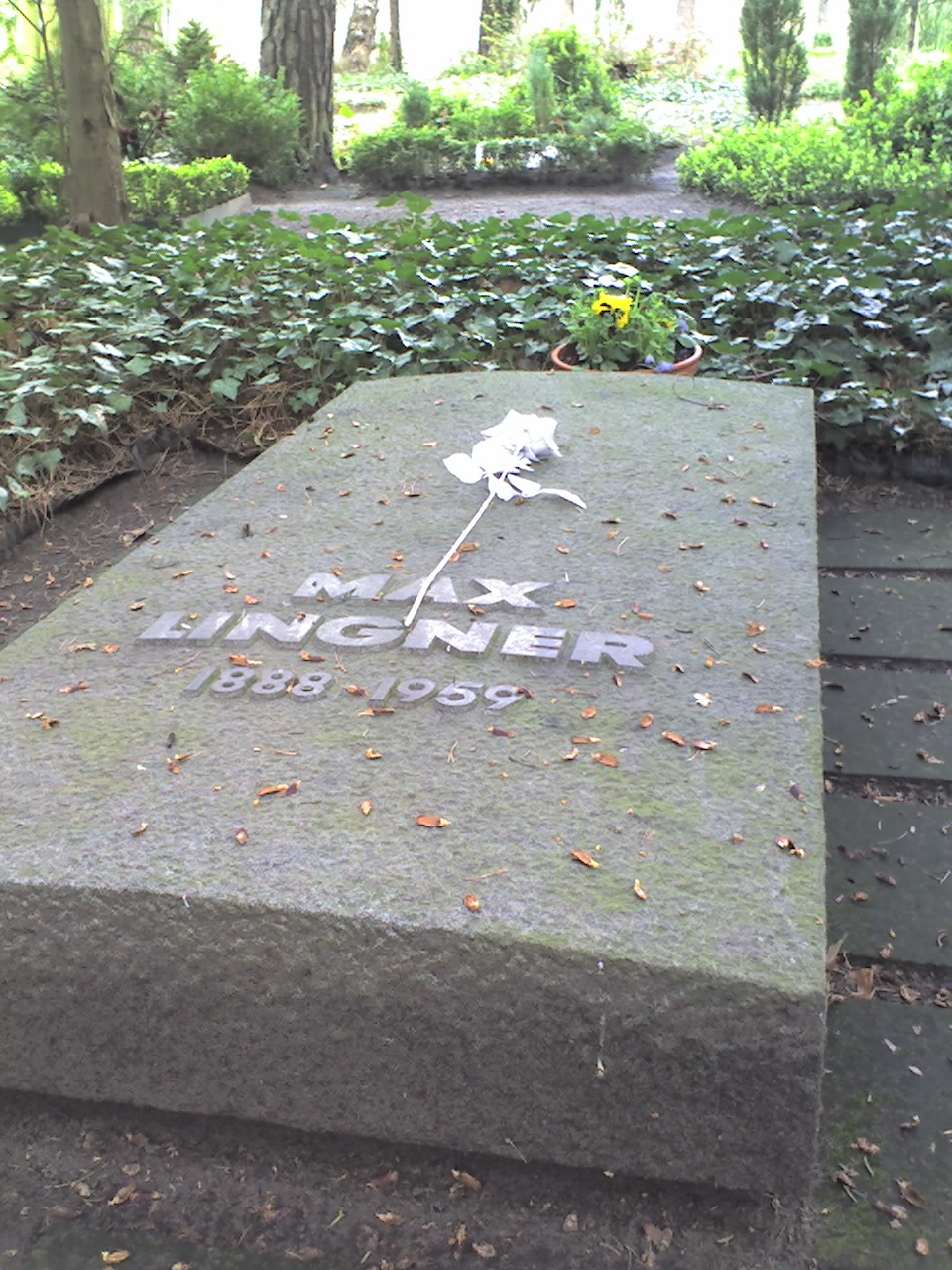 Grabstein von Max-Lingner, Ehrengrab des Landes Berlin